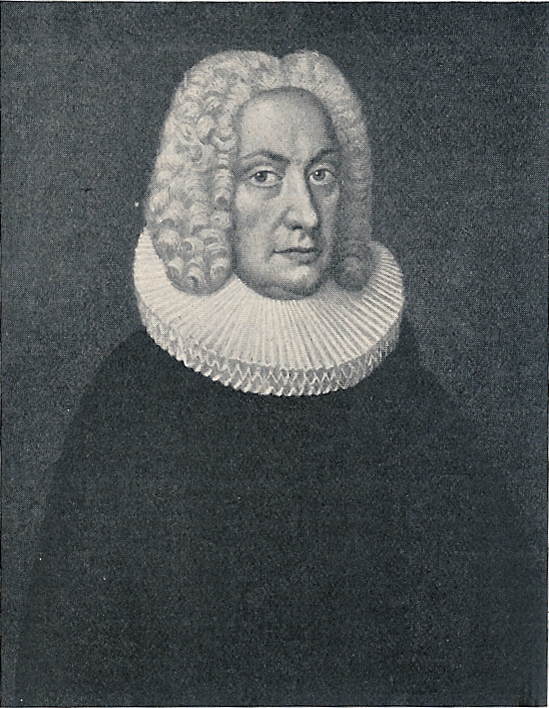 Hofpræst Johannes Bartholomæus Bluhme. 1681-1753.